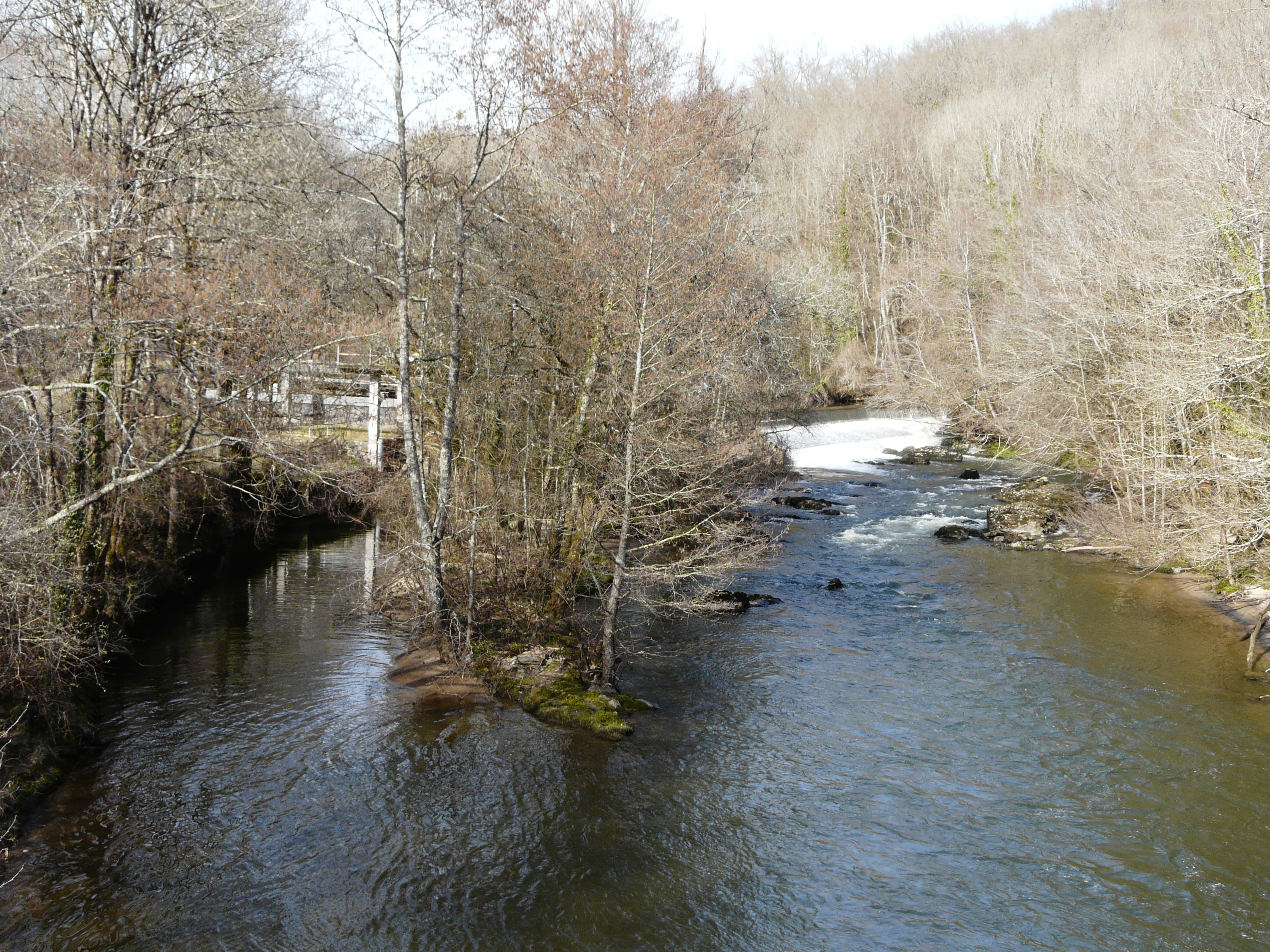 L'Auvézère au moulin du Pont (vue vers l'amont), Génis, Dordogne, France.